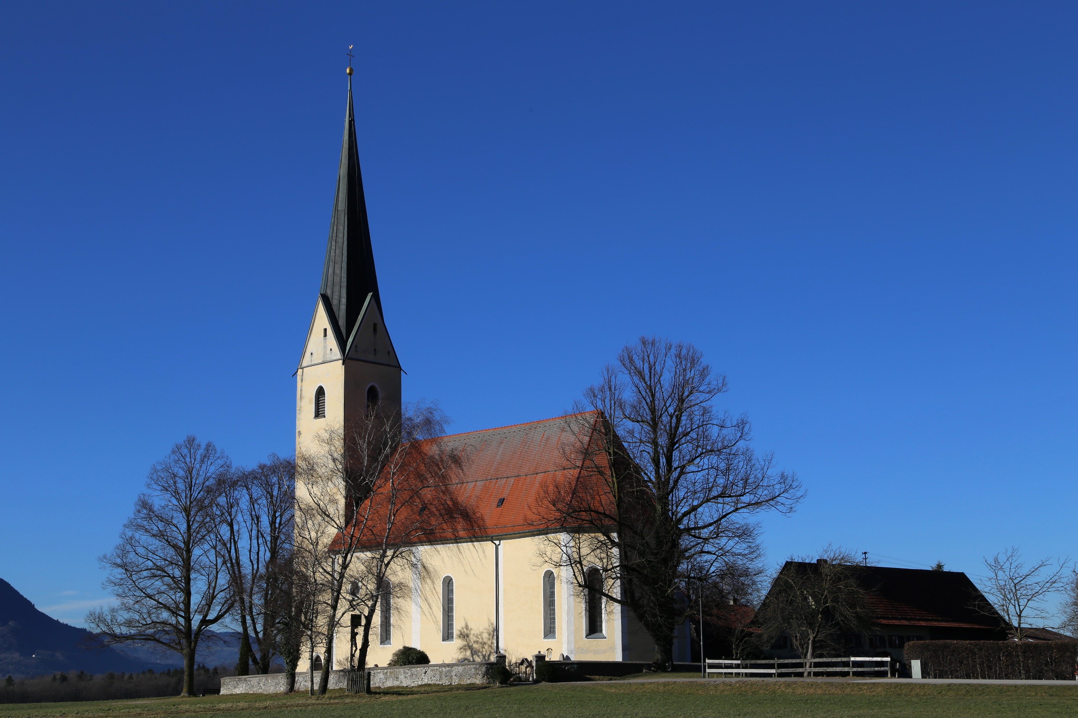 Leonhardiweg 9; Kath. Filial- und Wallfahrtskirche St. Leonhard, östliche Langhausmauern des Saalbaus romanisch, Chor mit dreiseitigem Schluss um 1420, westliches Langhaus, Westturm und Sakristei Mitte 15. Jh., 1760 barockisiert; mit Ausstattung; mit Friedhofsummauerung.